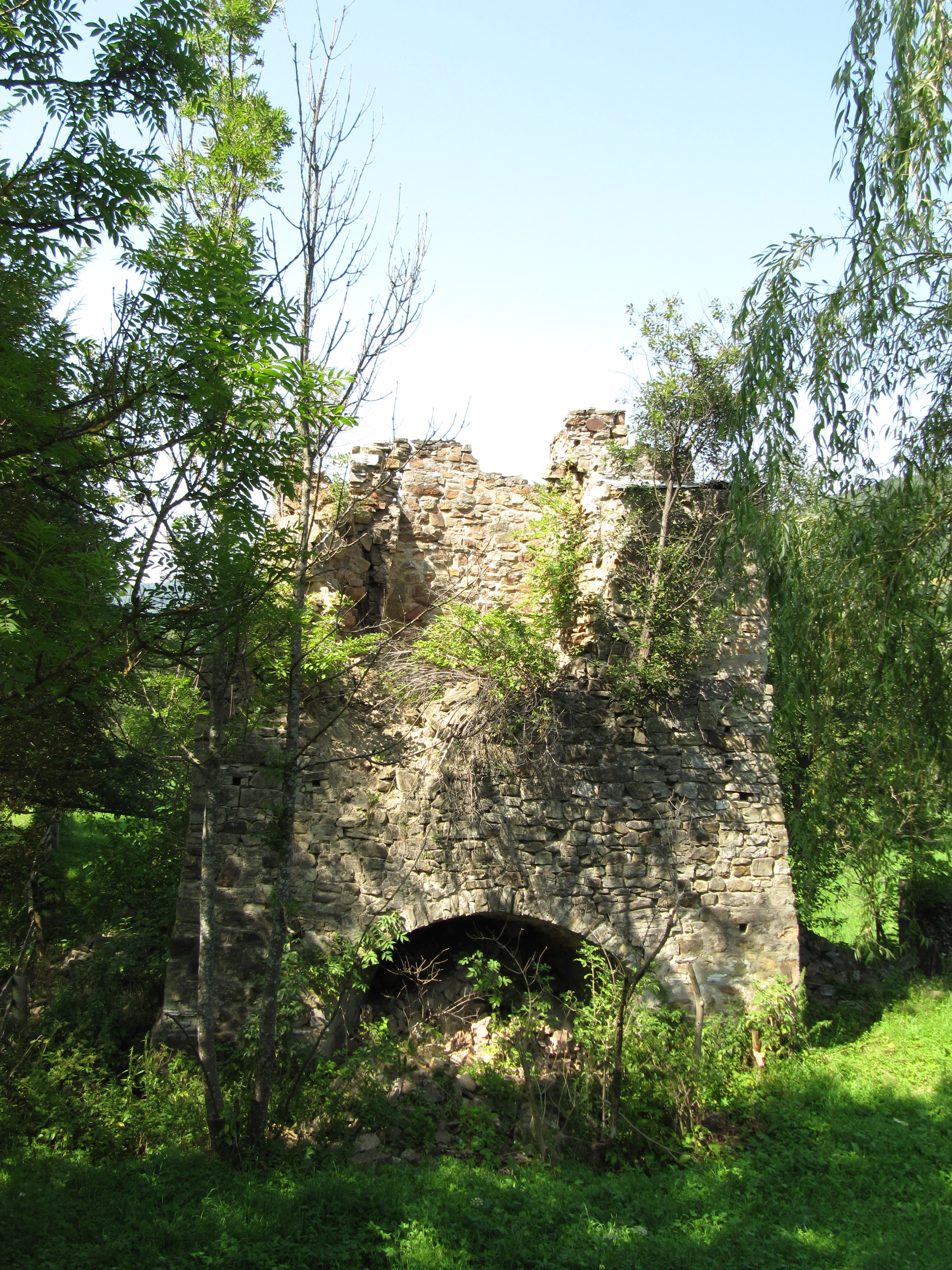 Гута (мур.), с. Майдан